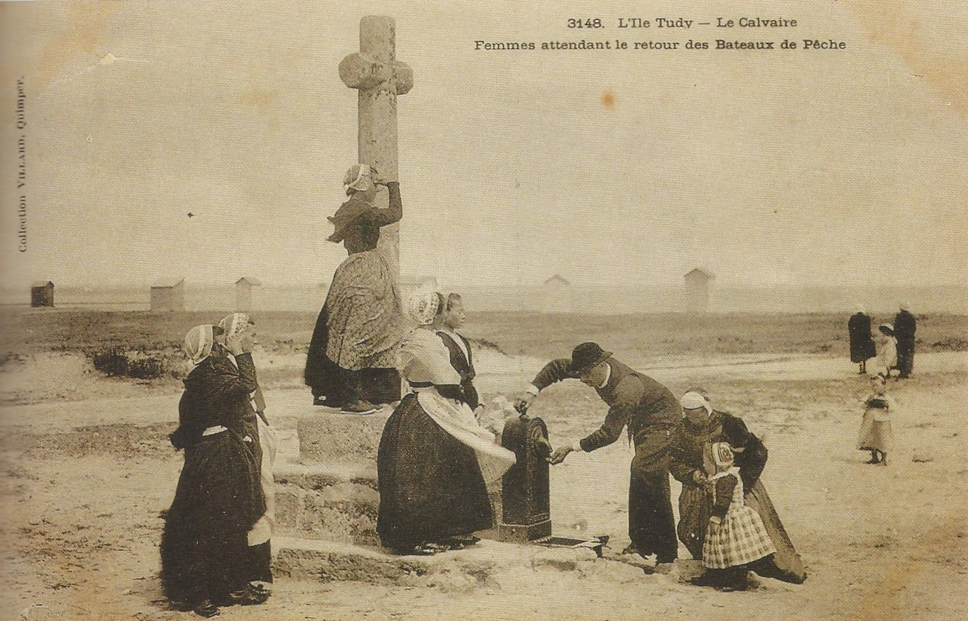 Île-Tudy : Le calvaire. Femmes attendant le retour des bateaux de pêche (vers 1930, carte postale collection Villard [Joseph-Marie Villard 1868-1935]). Sur cette photo, on voit aussi les cabines de plage qui existaient alors.